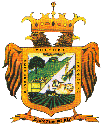 Escudo del Municipio de Zapotlán del Rey, municipio Nº 123 del Estado de Jalisco, México. Con su lema: Democracia, cultura, progreso.